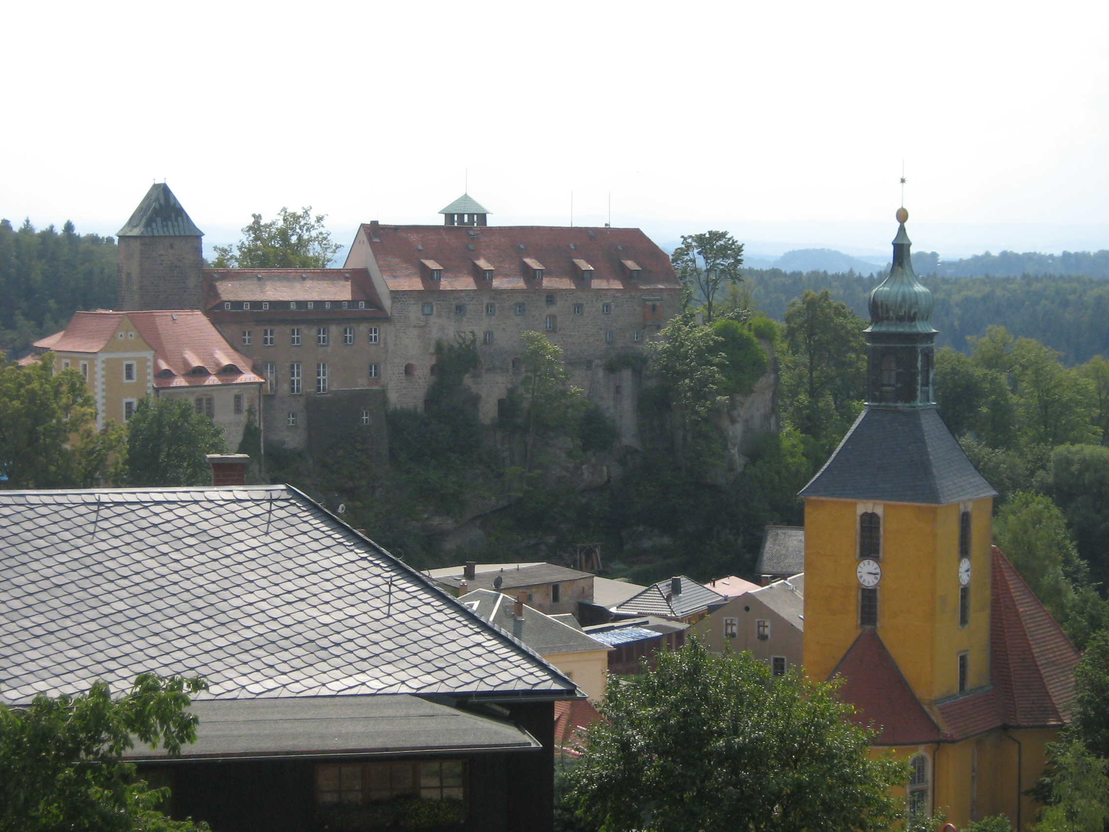 Hohnstein mit Kirche und Burg